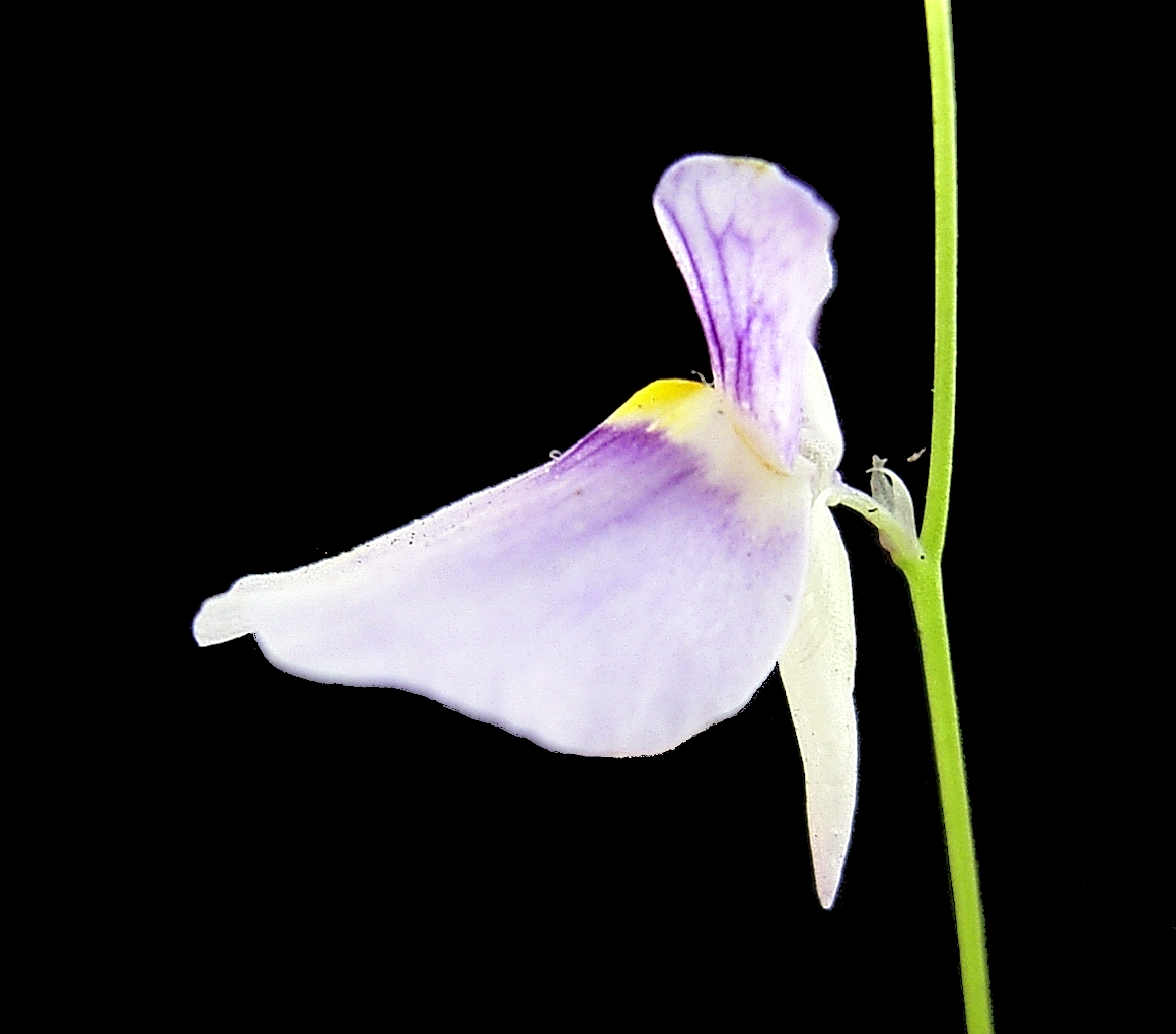 Utricularia blanchetii Flora